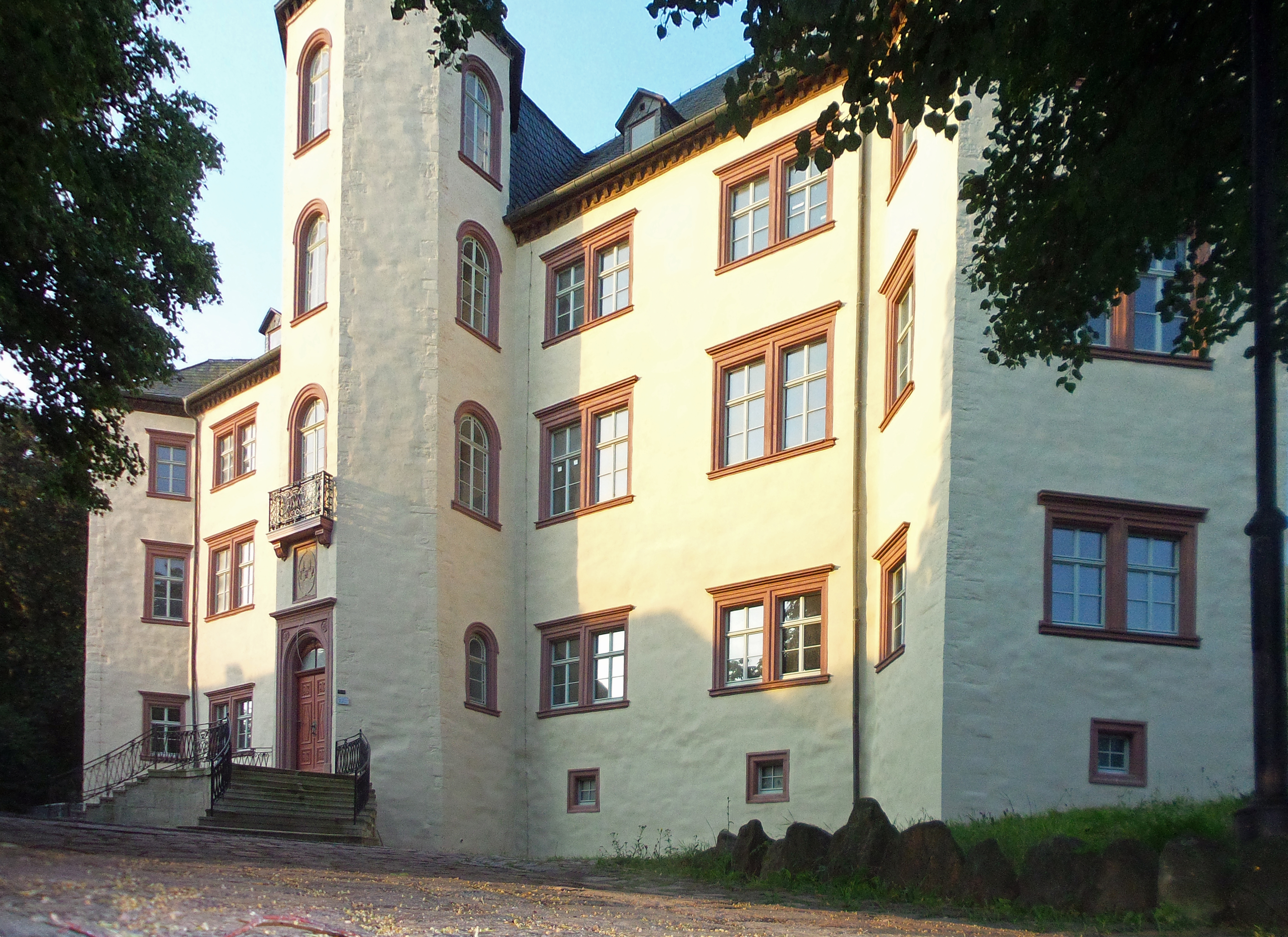 06571 Wiehe, Germany Schloss Wiehe